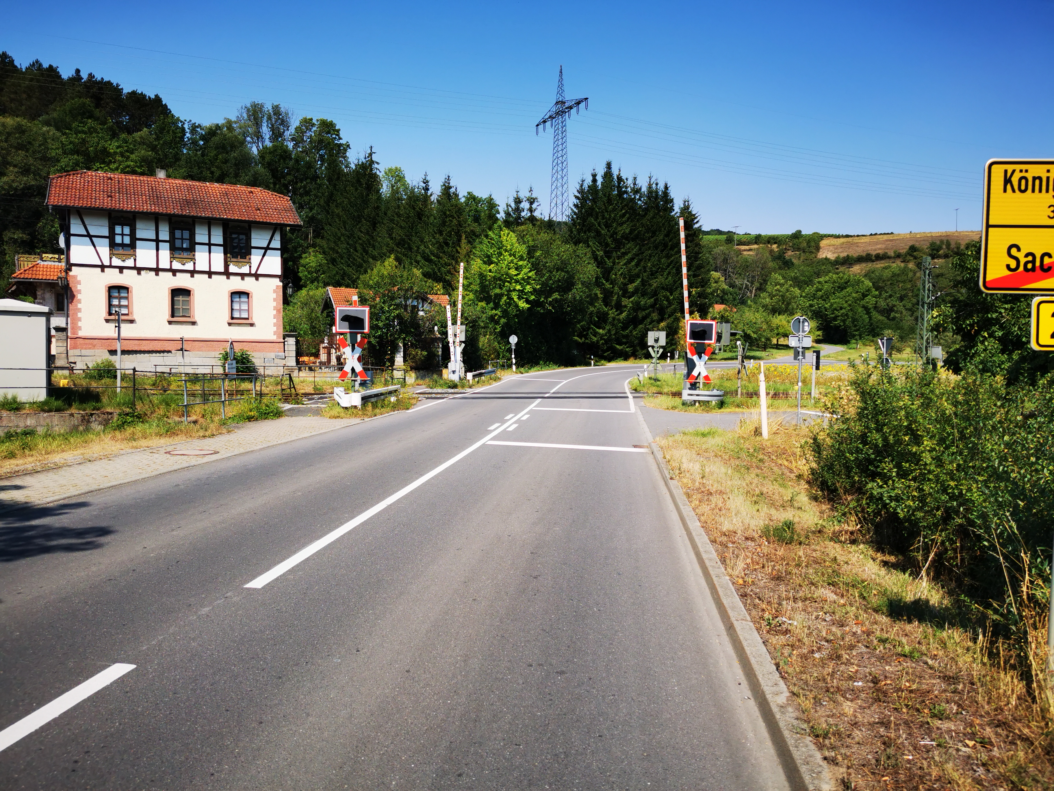 ehemaliger Haltepunkt Sachsenflur der Frankenbahn im Umpfertal; die B 292 mit Schranke